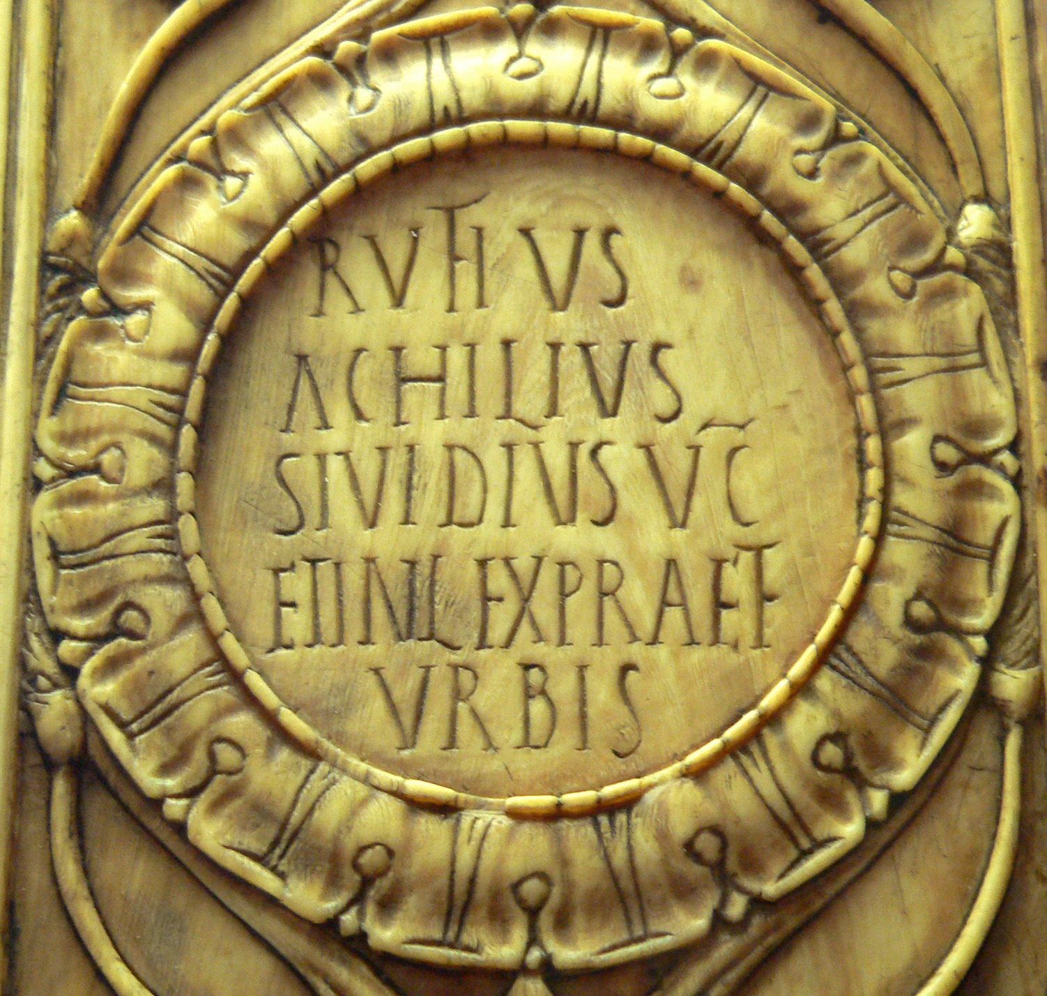 Feuillet du diptyque de Flavius Achilius Sividius Diptyque de Flavius Achilius Sividius, consul en 488, détail, Rome, ivoire d'éléphant, Ancien trésor du couvent de Géronde.